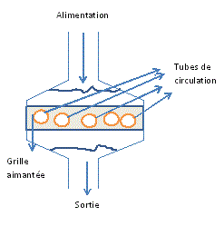 L'alimentation en liquide circule dans les tubes. Les particules ferromagnétiques ont retenues sur les parois (grille).